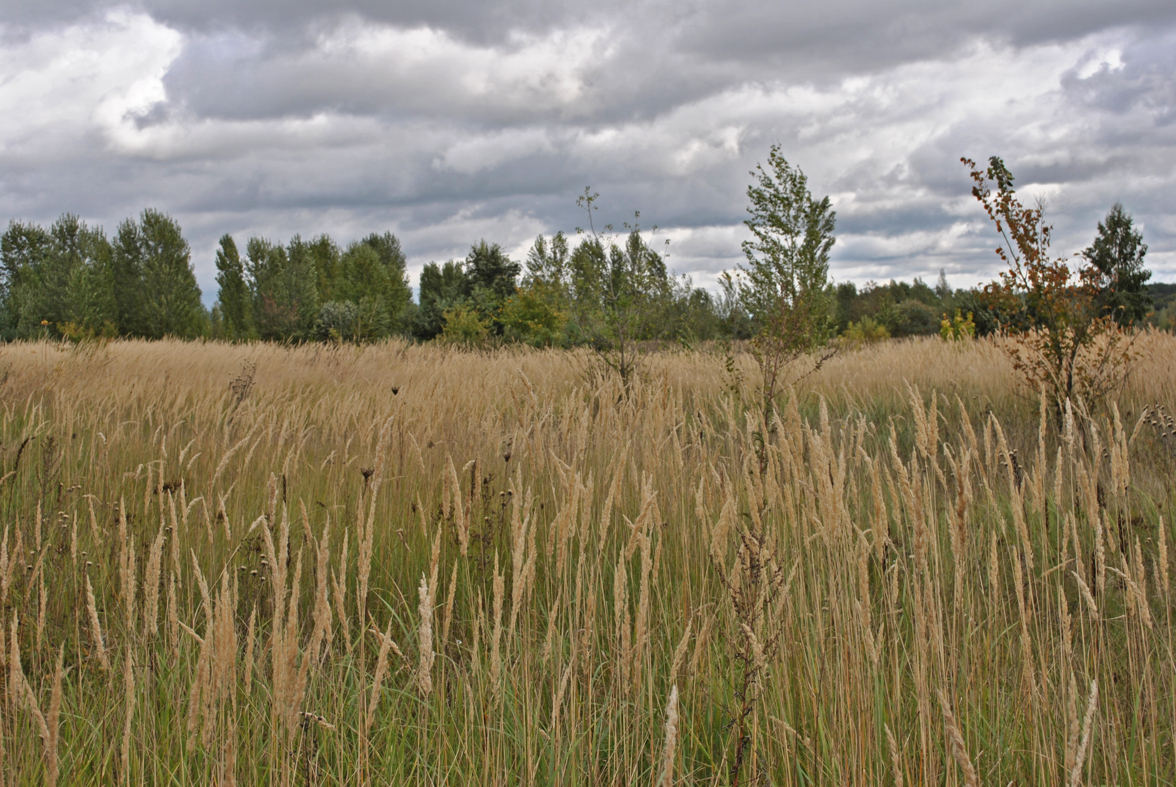 «Дулицьке», Сквирський район, в адміністративних межах Шамраївської та Дулицької сільської рад